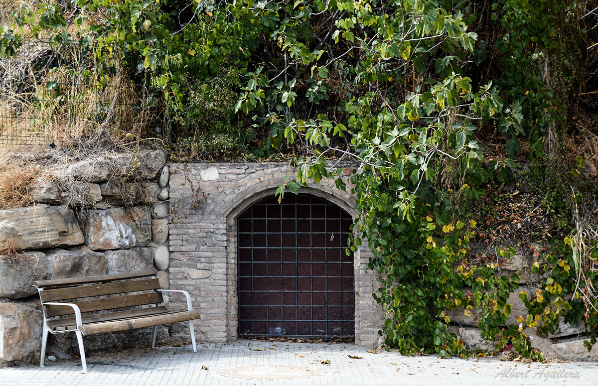 Refugi antiaeri de la guerra civil Espanyola, als terrenys de Can Pau Moragues de Parets del Vallès